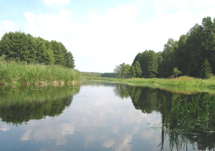 Rzeka Omulew